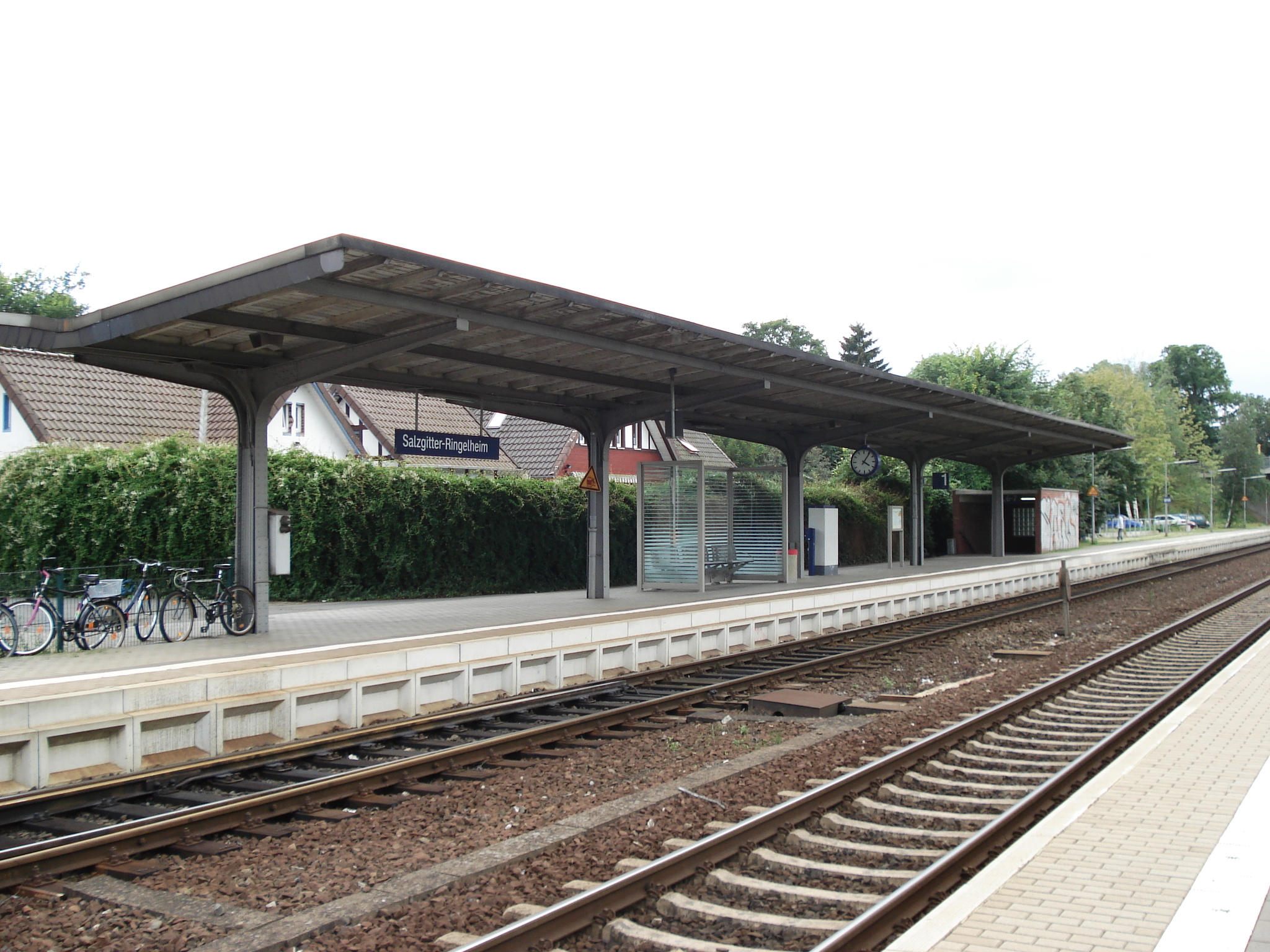 Gleis 1 fotografiert von Gleis 2 aus